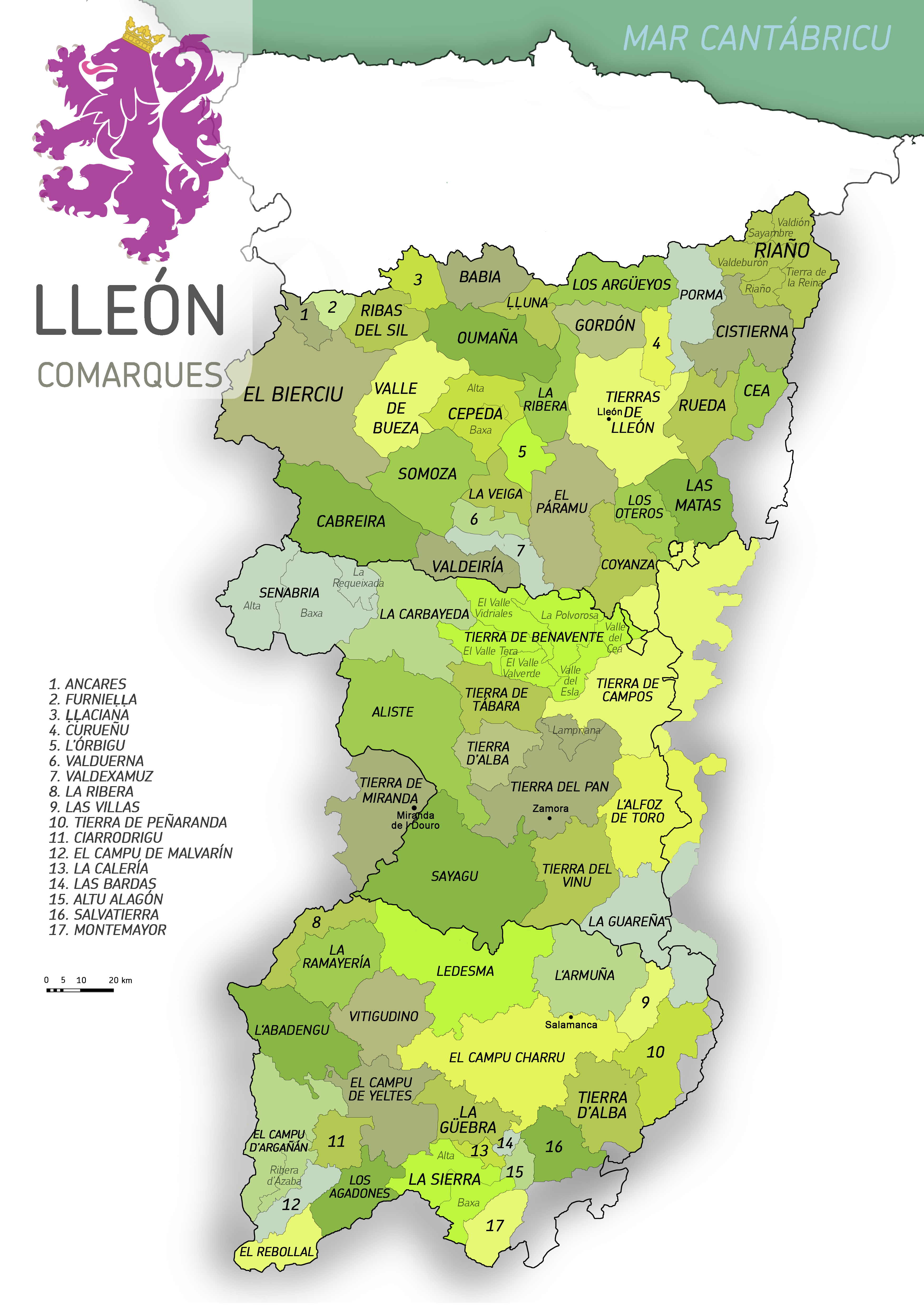 Comarques histórico-tradicionales de Llión: Por razones históriques o culturales omití delles comarques como la de Béjar o amesté otres como la Tierra de Miranda. Tamién, nos casos de comarques onde l'asturianu/lleonés lleva muertu munchos años, tenté de dexar a un llau los complexos a la hora d'adaptar llingüísticamente con sobriedá dalgunos topónimos al nuesu idioma. Con esto -quede claro- nun pretendo presentar una idealización esencialista del país nin imponer nengún criteriu, sinón ofrecer un averamientu mui xeneral a la so estrutura territorial, con un usu útil pa la Wikipedia n'asturianu y pa la comunidá asturianofalante. Por supuestu, esti mapa nun ye perfectu y ye susceptible de modificaciones d'acuerdu a futures contrastaciones de bibliografía. IMPORTANTE: Como afiten les etiquetes de llicencia de Commons, esta obra pue ser distribuida llibremente baxo les condiciones de "reconocimientu d'autoría" y de "non xeneración d'obres derivaes".